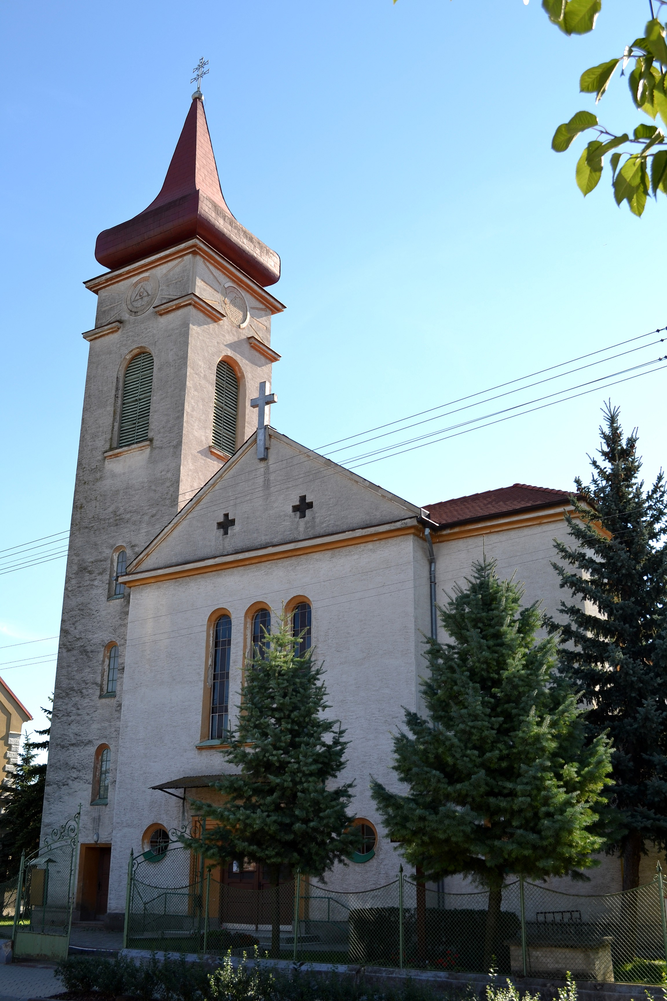 Križovany nad Dudváhom (okr. Trnava), Kostol Povýšenia svätého Kríža; celkový pohľad od západu